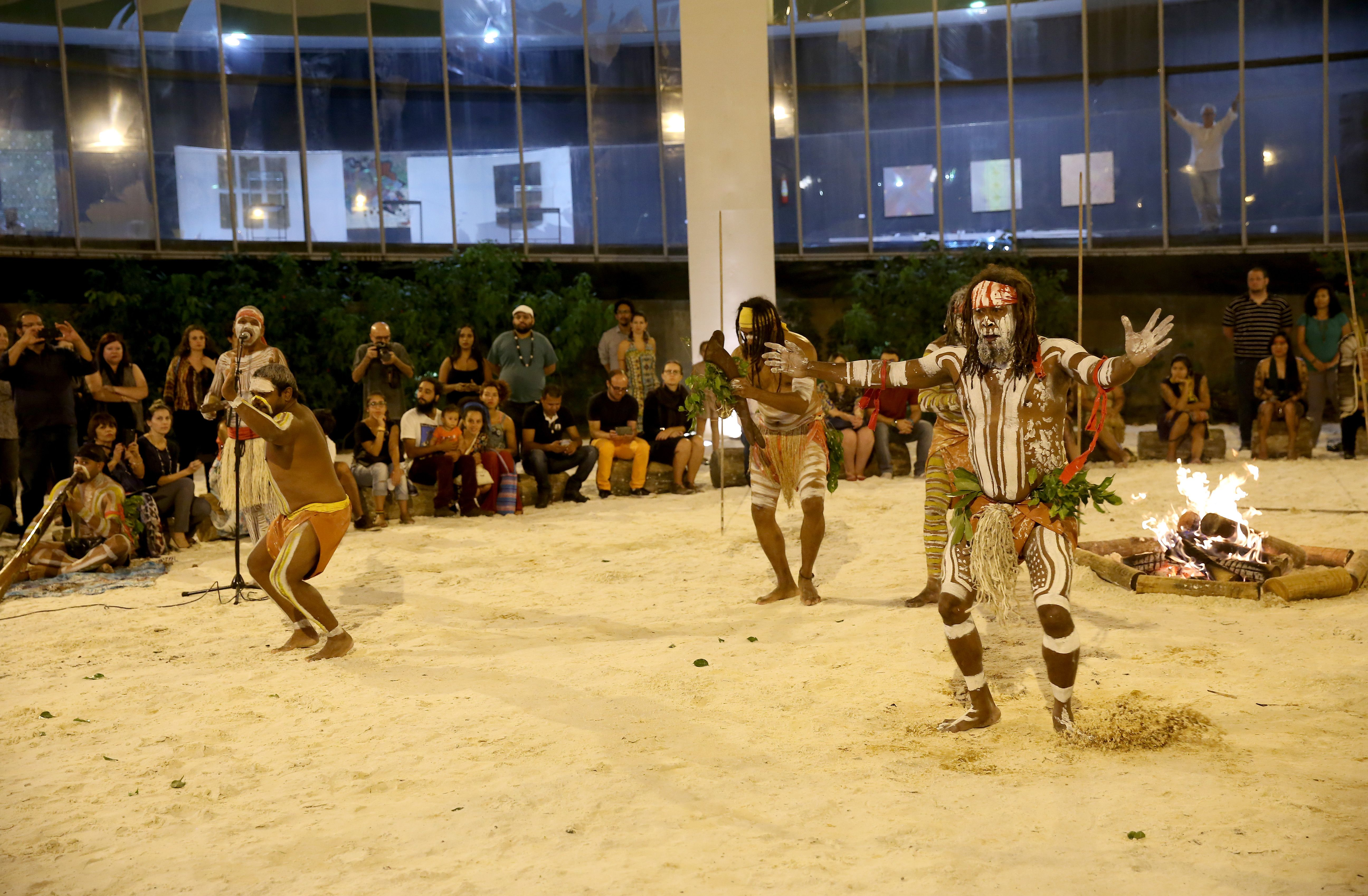 Brasília - Em homenagem ao Dia do Índio, Brasília recebe exposição Armadilhas Indígenas, com apresentação do grupo aborígene australiano Descendance.